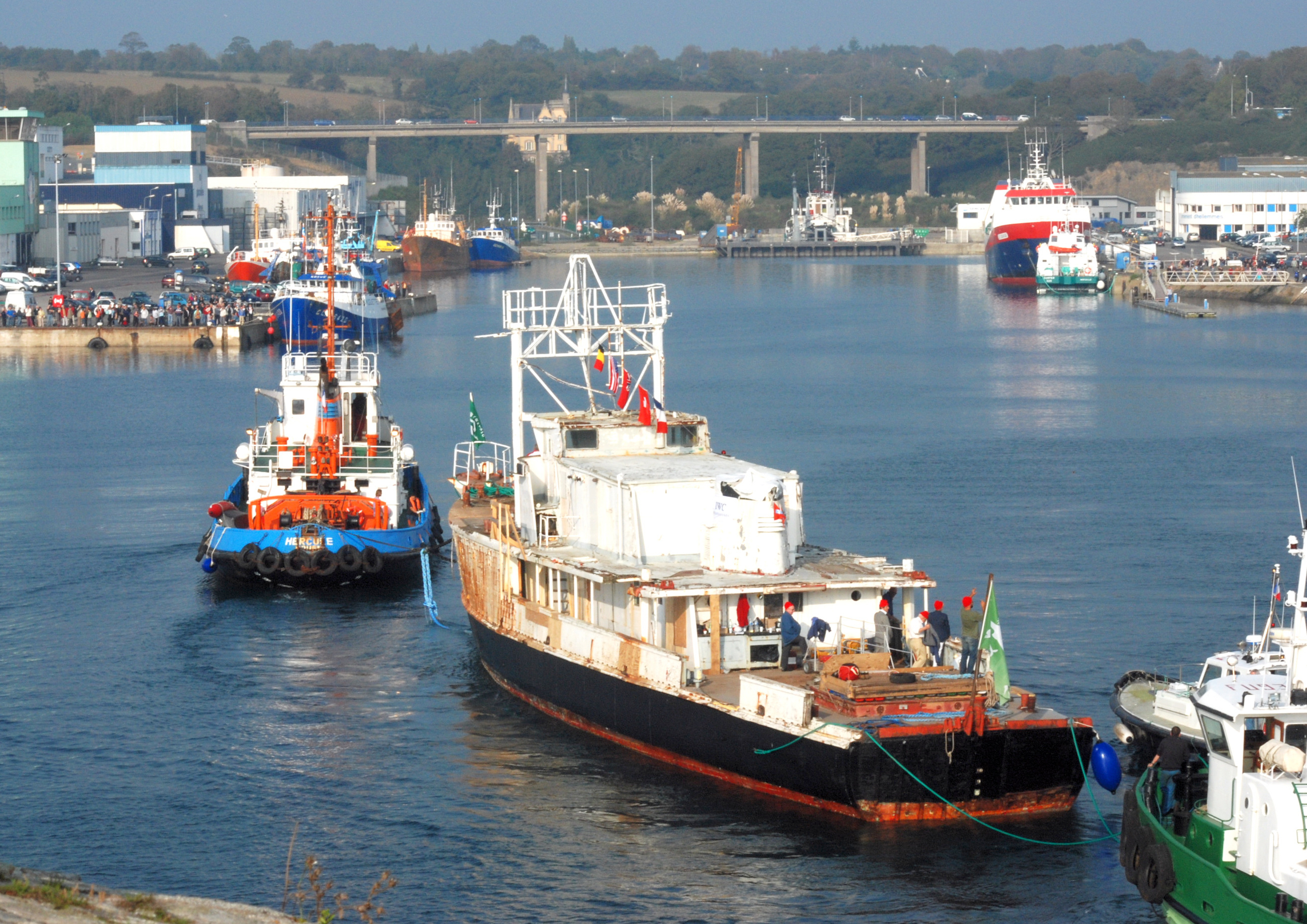 le célèbre bateau de Cousteau, arrive a Concarneau, pour sa restauration Tug Hercule: Built: 1959 IMO number: 8896209 Callsign: FGYV